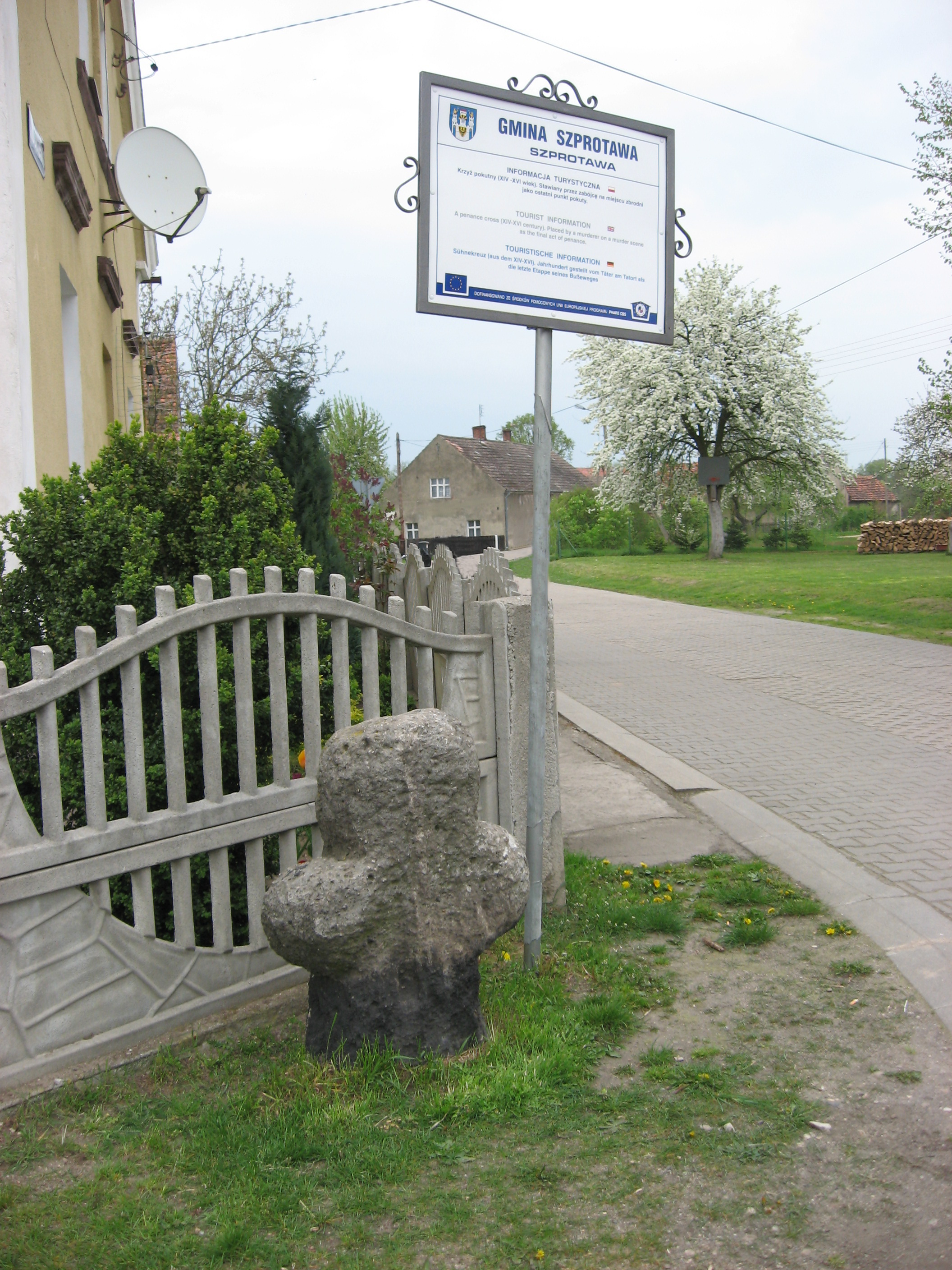 Krzyż kamienny w Puszczykowie (woj. lubuskie).